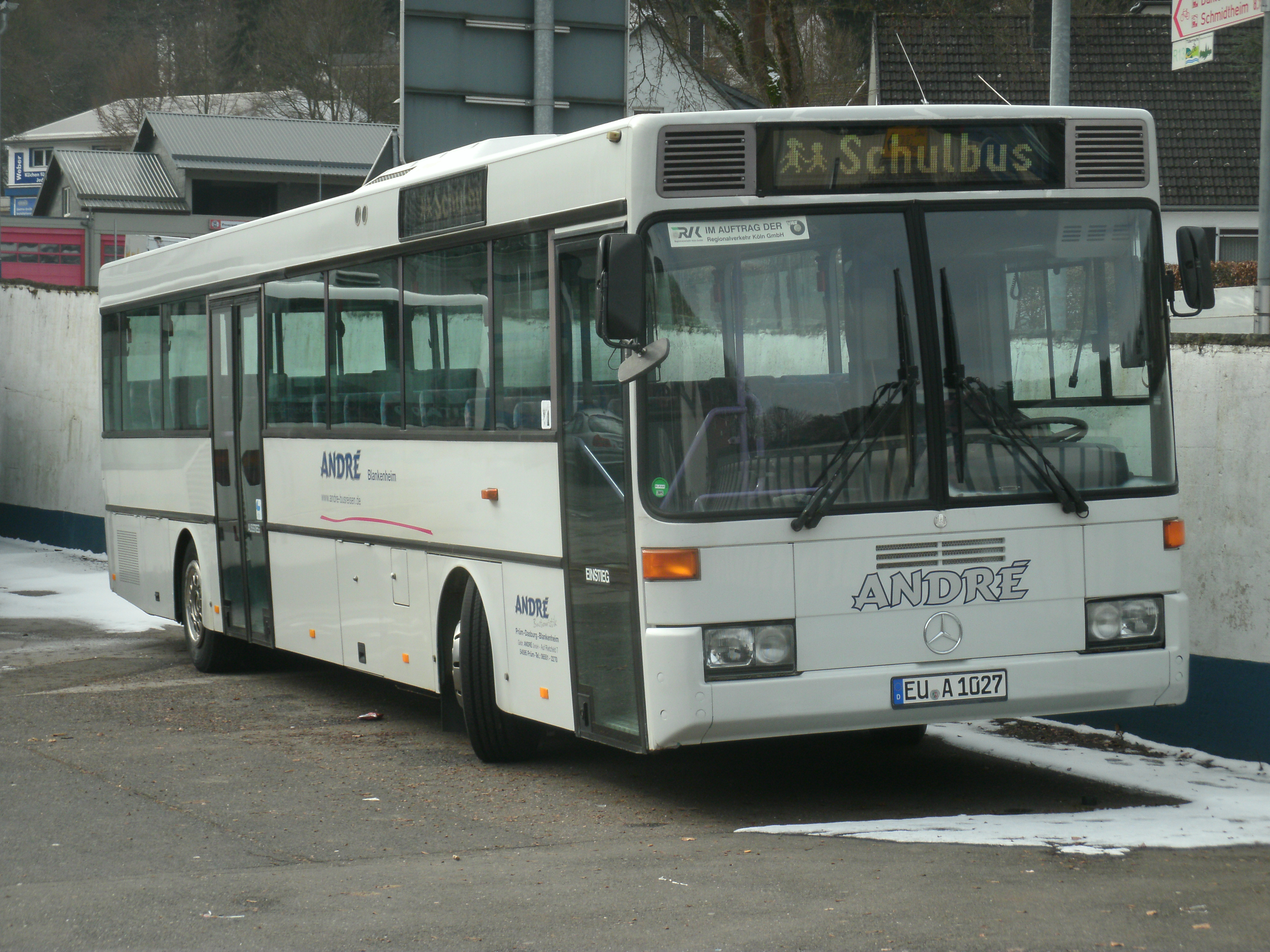 Ein Überland-Hochflurbus des Typs Mercedes-Benz O 407 von André Bustouristik auf dem André Betriebshof in Blankenheim (Ahr). Das abgebildete Fahrzeug verkehrt im Auftragsverkehr für die Regionalverkehr Köln (RVK).